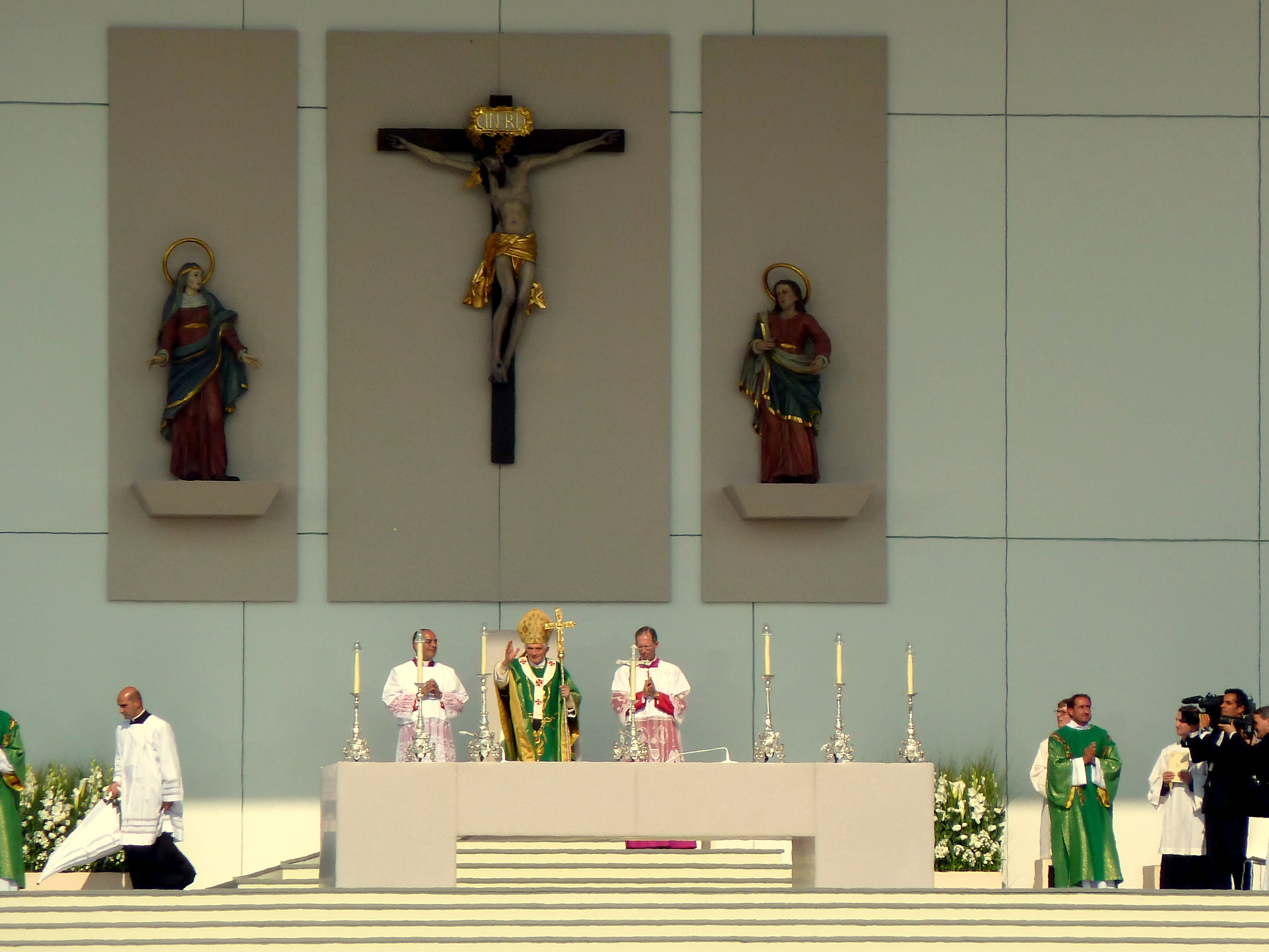 Papst Benedikt XVI. an seiner heiligen Messe in Freiburg, anlässlich seiner dritten apostolischen Reise in Deutschland. Die barocke Kreuzigungsgruppe des Bildhauers Hans Schenck vom 1622 wurde aus dem Radolfzeller Münster für den Altar der Papstmesse hierher gebracht.